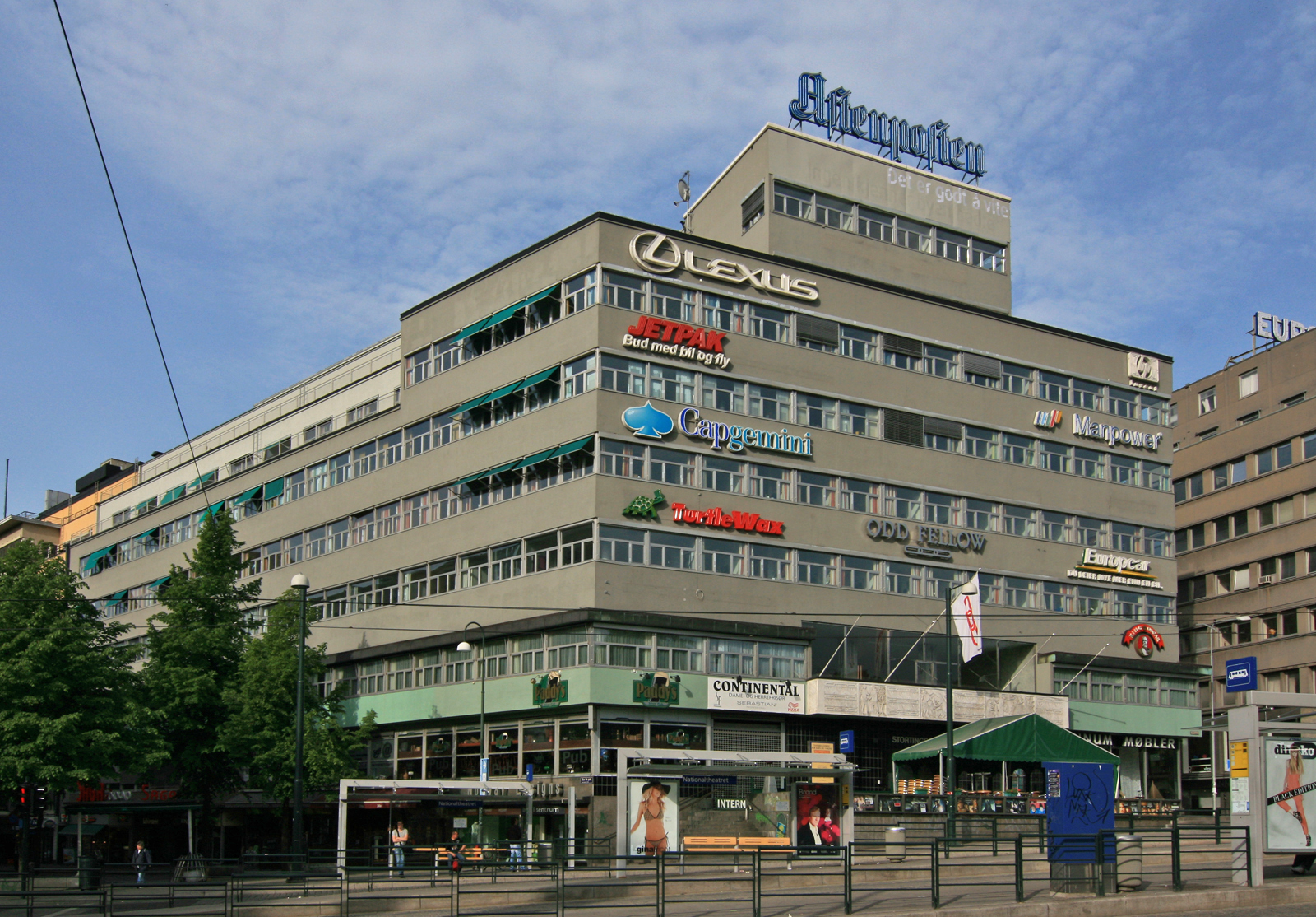 Odd Fellow-gården, Stortingsgata 28, Oslo. Bygd 1934. Arkitekter: Gudolf Blakstad og Herman Munthe-Kaas.